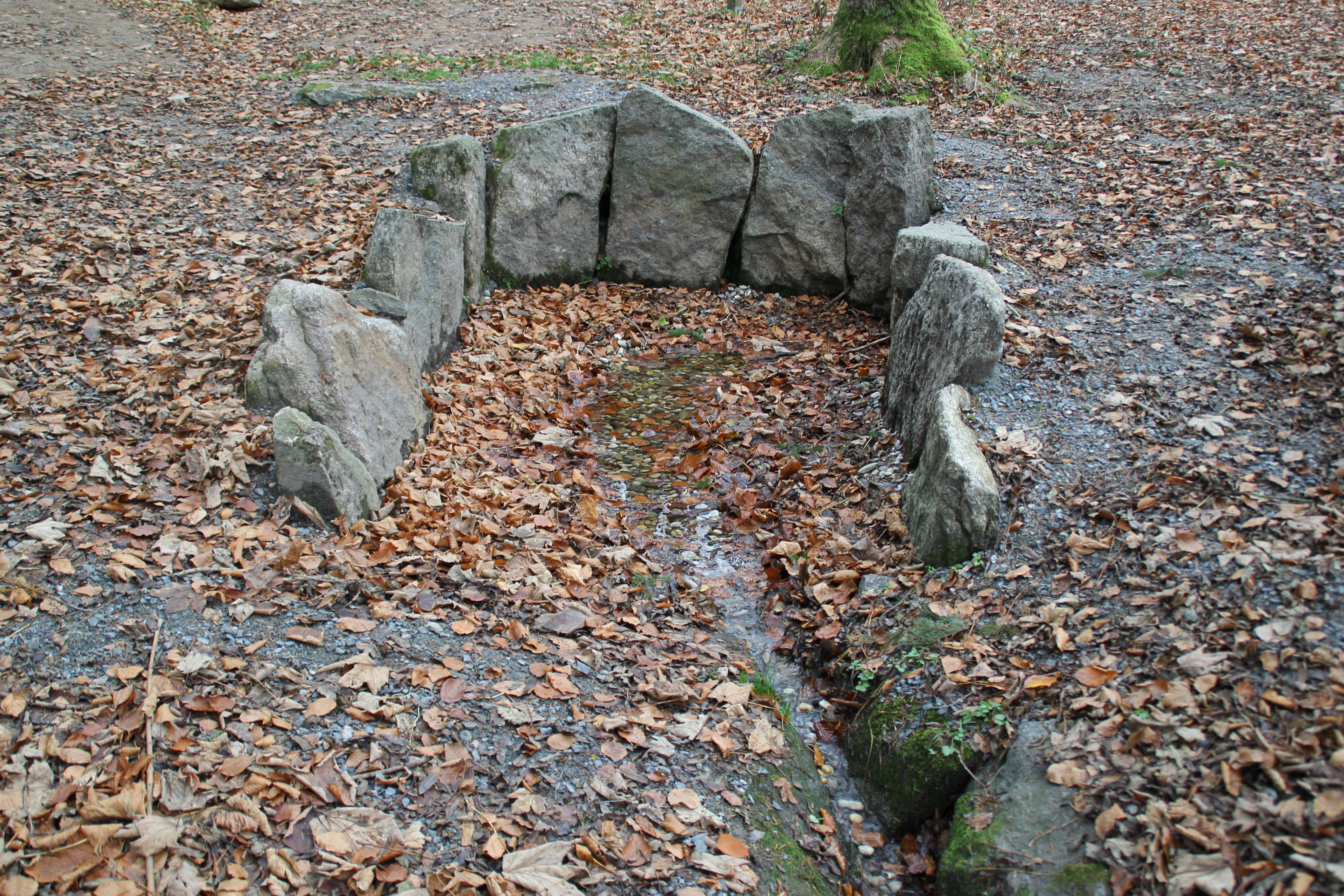 Die Mergbach-Quelle (früher Gersprenz-Quelle) bei Winterkasten